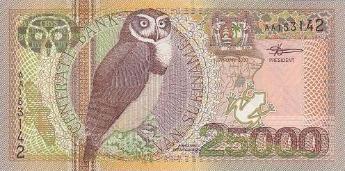 25.000 Fiorini surinamesi raffiguranti nel dritto il Pulsatrix perspicillata